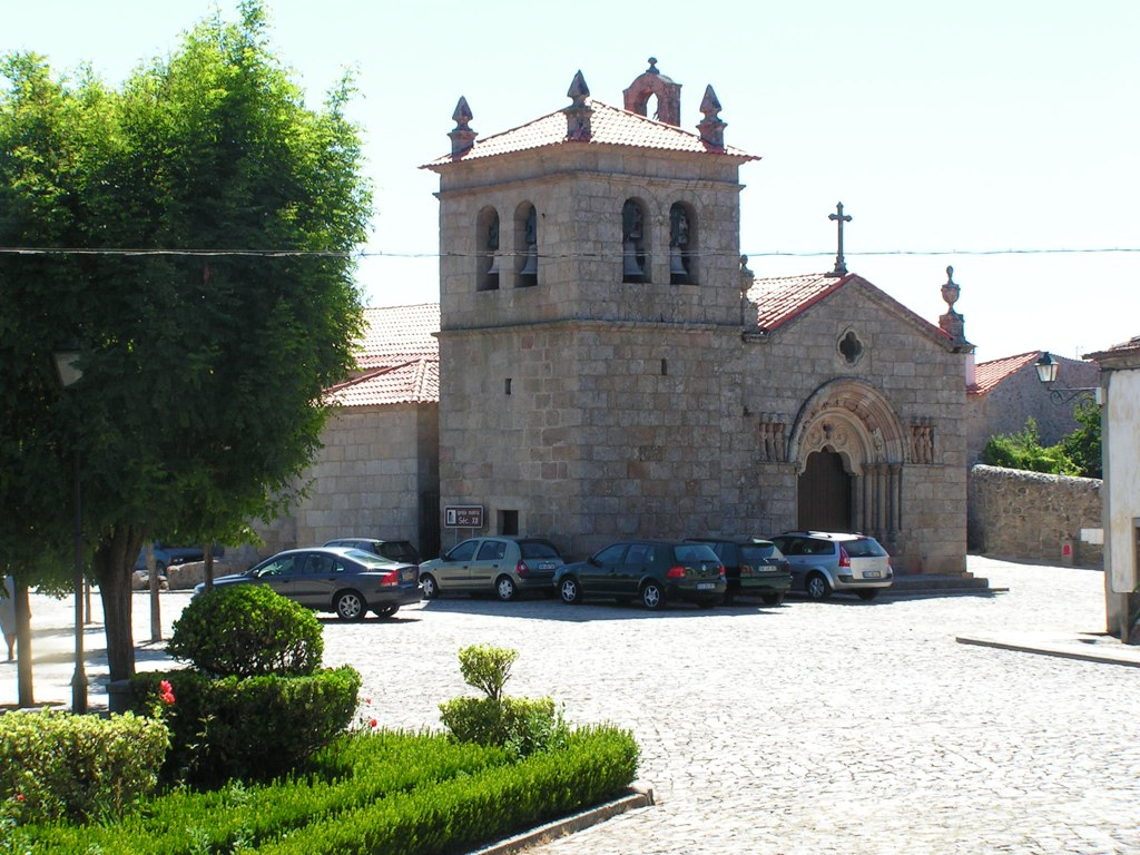 Fachada principal